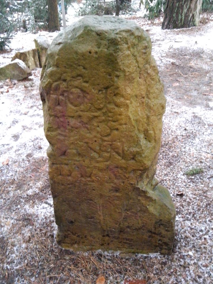 Mordsteine Bielefeld-Sennestadt. Baudenkmal. Hier Gedenkstein für die ermordete Mutter. Vorderseite.